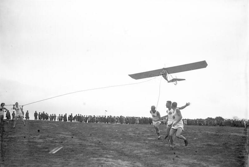 Unsere Studenten lernen Segelfliegen! Der fliegende Student beim ersten Segelflug in den Gatower Bergen.